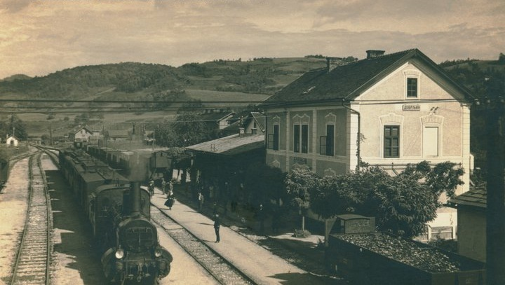 Als erste Bahn Bosnien-Herzegowinas wurde Strecke Banja Luka–Dobrljin am 24. Dezember 1872 in Betrieb genommen. Die 47,7 km lange Bahnstrecke Sisak–Dobrljin wurde am 10. April 1882 eröffnet, womit nach zehn Jahren Dobrljin mit den Bahnen der österreichisch-ungarischen Monarchie verbunden war. 46,3 km der Strecke lagen in Kroatien und nur 1,4 km in Bosnien und Herzegowina.